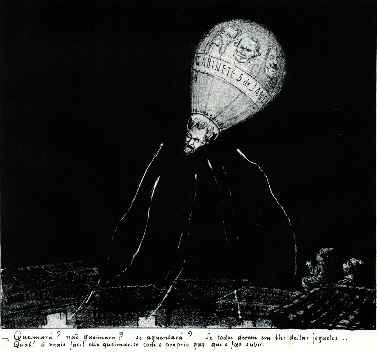 Revista-Illustrada-Ano3-n.118-1878(img1)